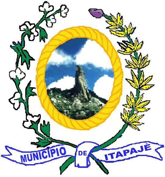 Brasão do município de Itapajé, estado do Ceará, Brasil.